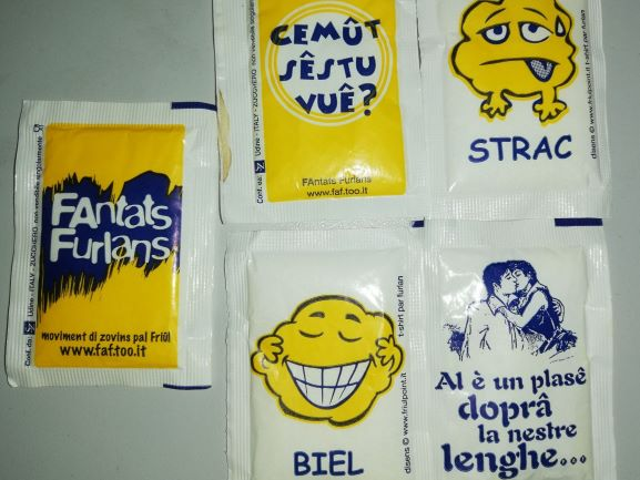 Zuckersäckchen der „Fantats Furlans“, der friaulischen Jugend, gefunden ca. 2014 in Udine.